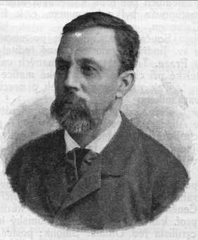 Josef Jan Baptist Cainer (1837–1917, český varhaník a hudební skladatel